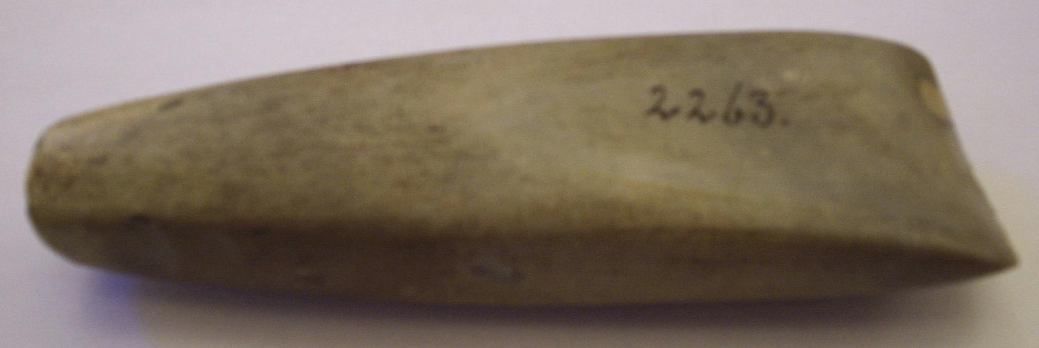 Gropkeramisk tväryxa, hittad som lösfynd i Fristads socken i Västergötland, fotograferad den 18 oktober 2005 av Harri Blomberg. (Siffran 2263 är ett inventeringsnummer.)